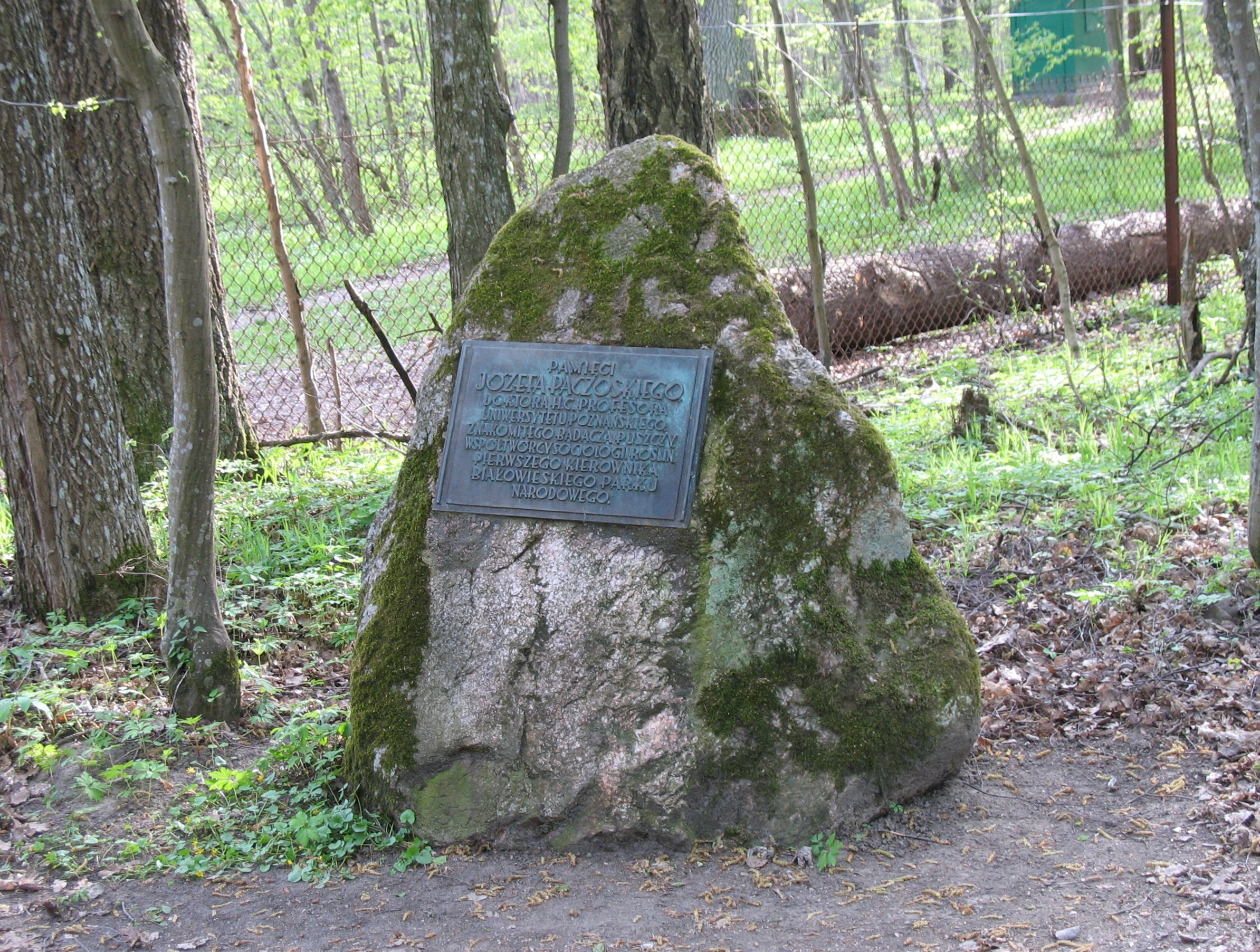 Tablica pamiątkowa poświęcona pamięci Józefa Konrada Paczoskiego, umieszczona obok bramy rezerwatu ścisłego Białowieskiego Parku Narodowego